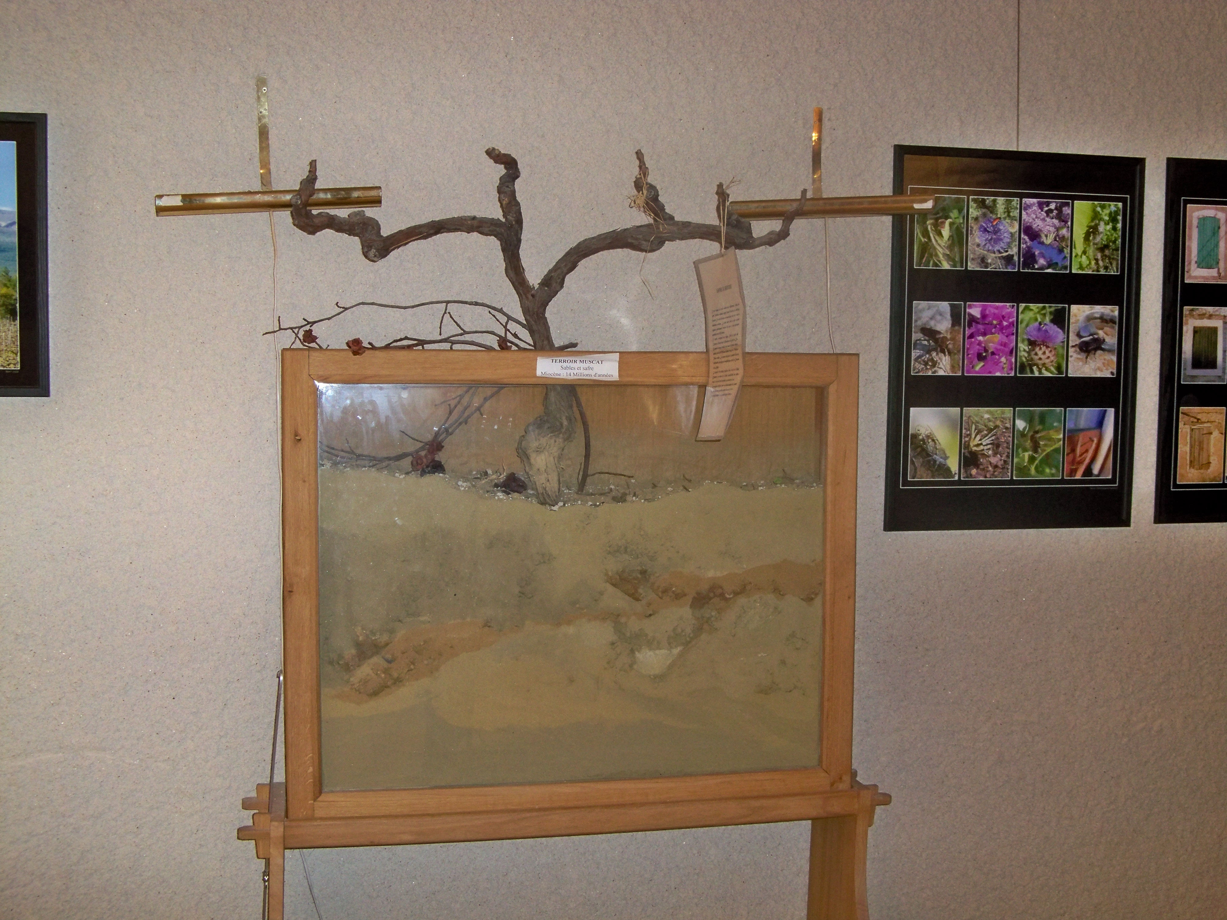 Vigne de Beaumes de Venise, Terroir Muscat